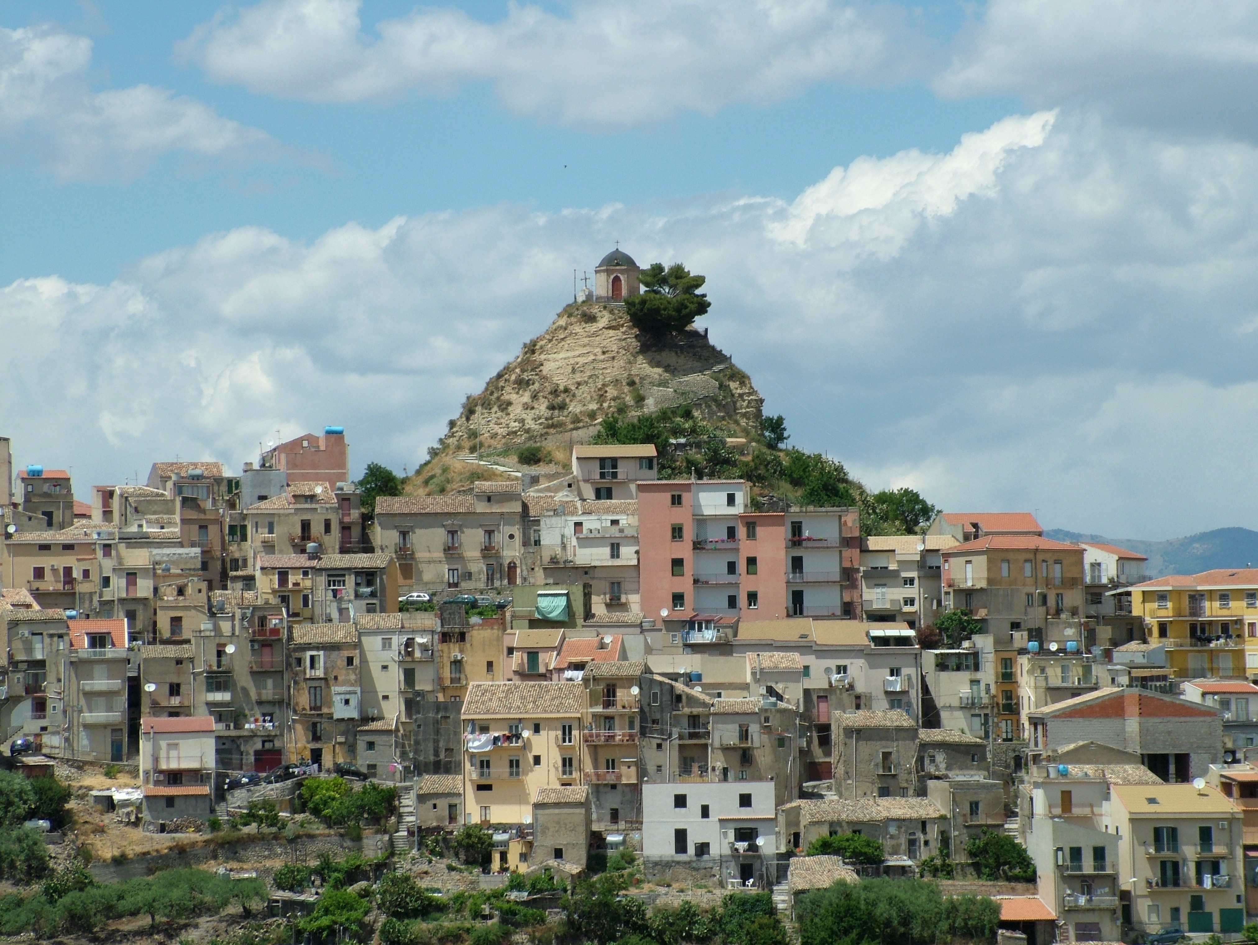 Centuripe Provinz Enna, Sizilien